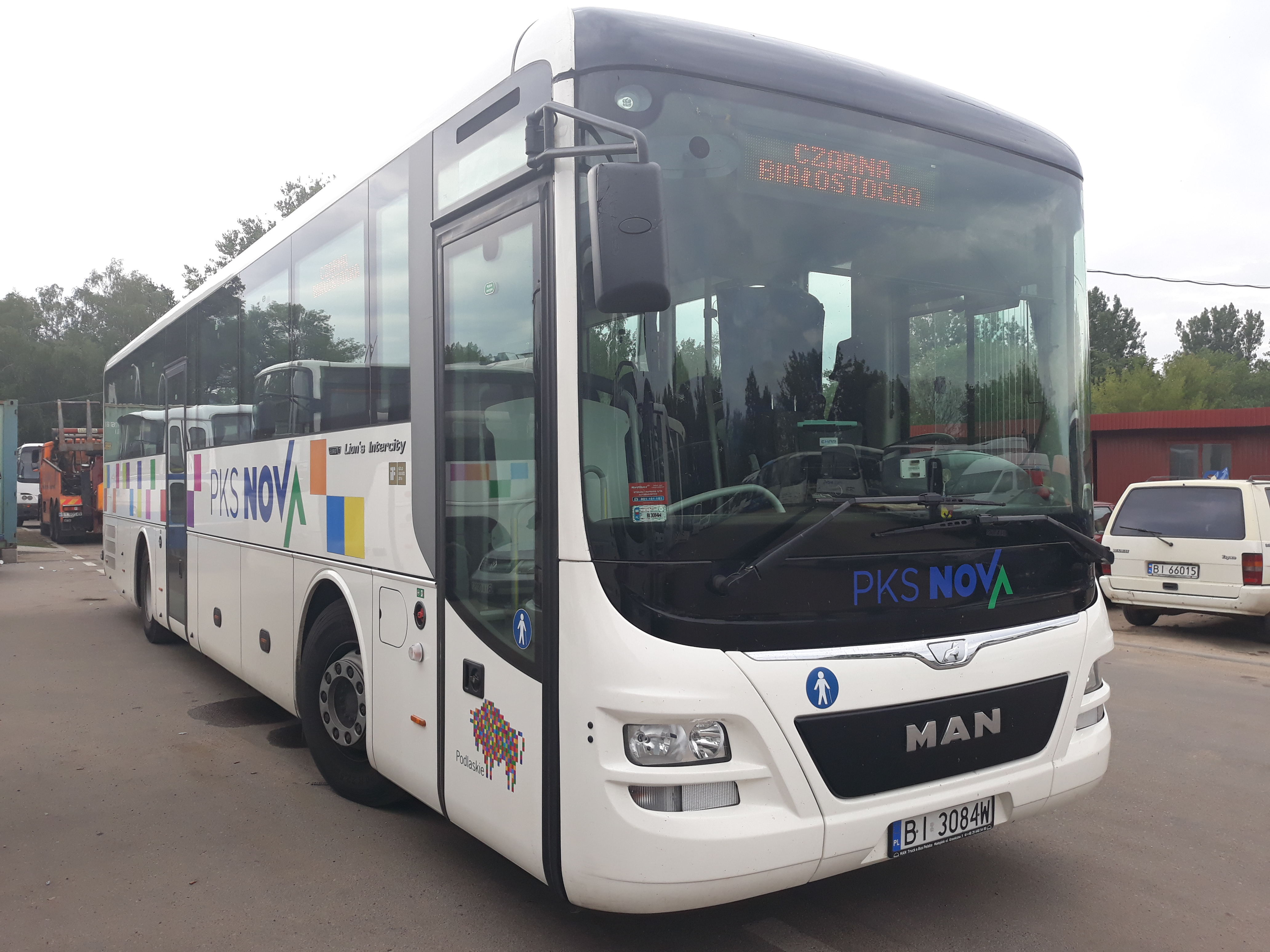 MAN PKS Nova